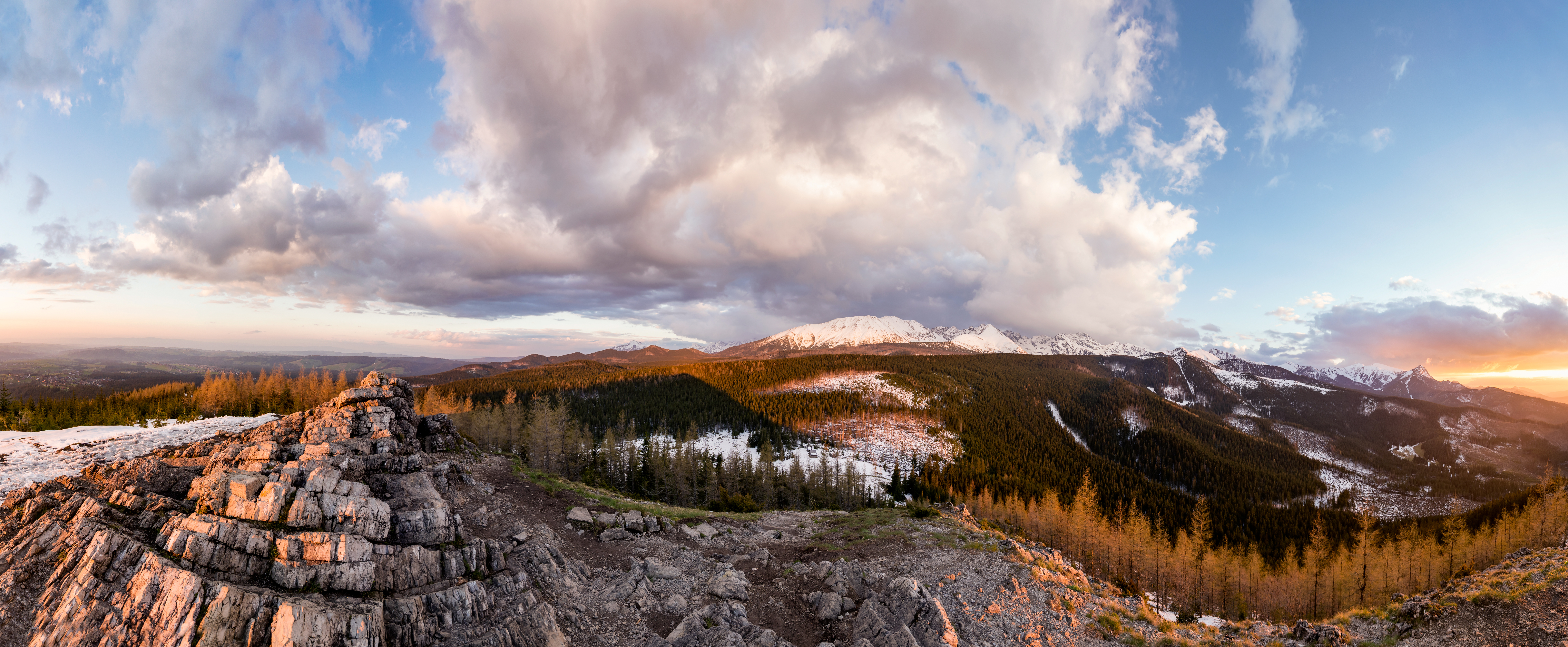 Park narodowy: Tatrzański Park Narodowy This is a photography of protected area with CRFOP ID PL.ZIPOP.1393.PN.14